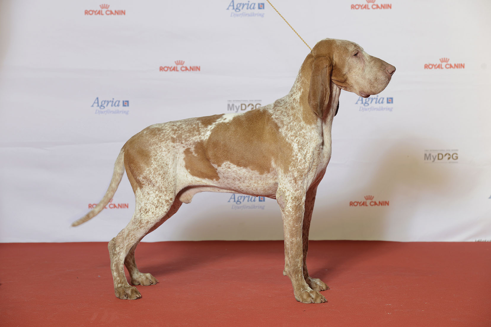 BIR Grupp 7 BRACCO ITALIANO C.I.E. DK JV-12 DK V-13 DK&NO UCH J SV&NO V-14 Nuits Di Montemassi MyDOG, Nordens största hundevenemang